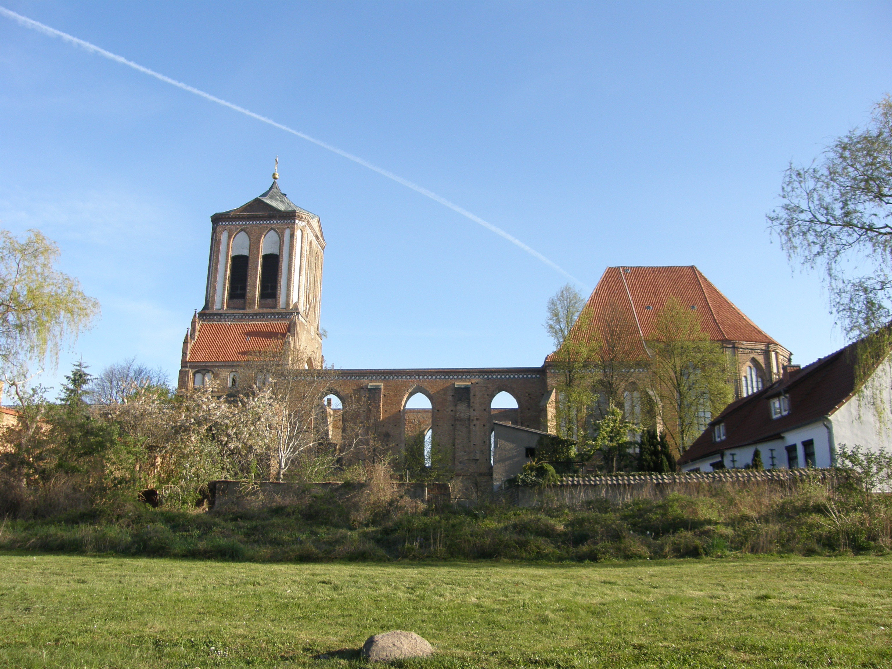 niecały kościół, ale czynny